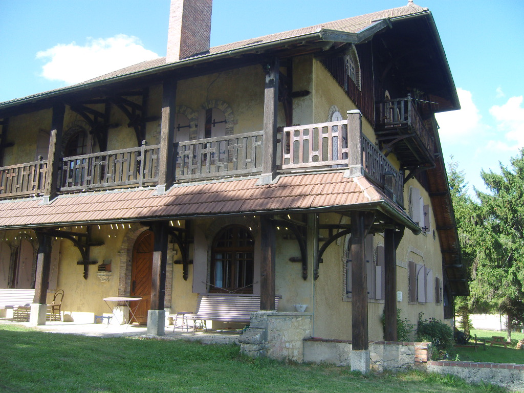 Les Grangettes (Doubs - France) - demeure de Monte-au-Lever, monument historique